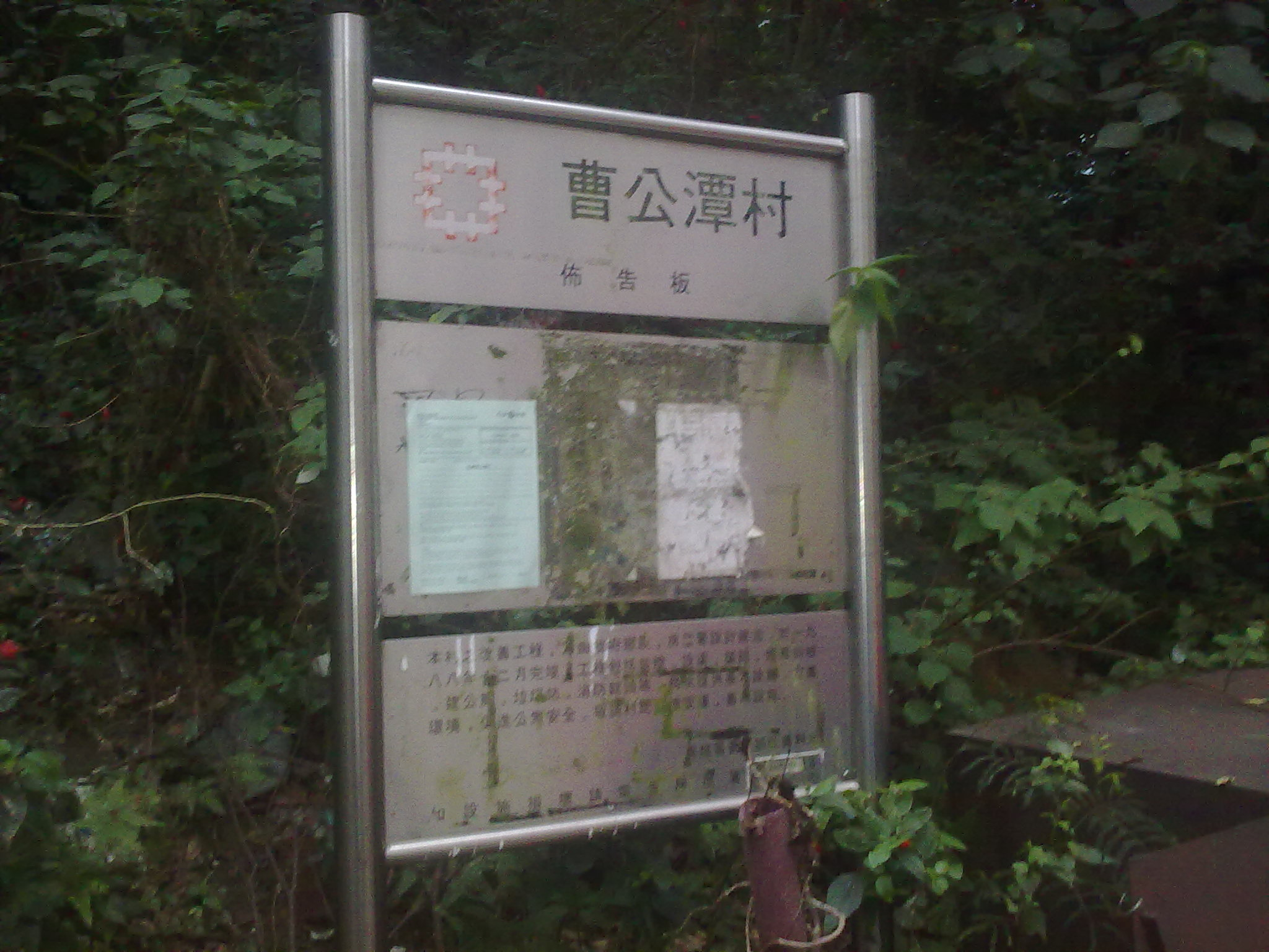 已荒廢的曹公潭村，位於曹公潭與荃錦公路之間的山坡